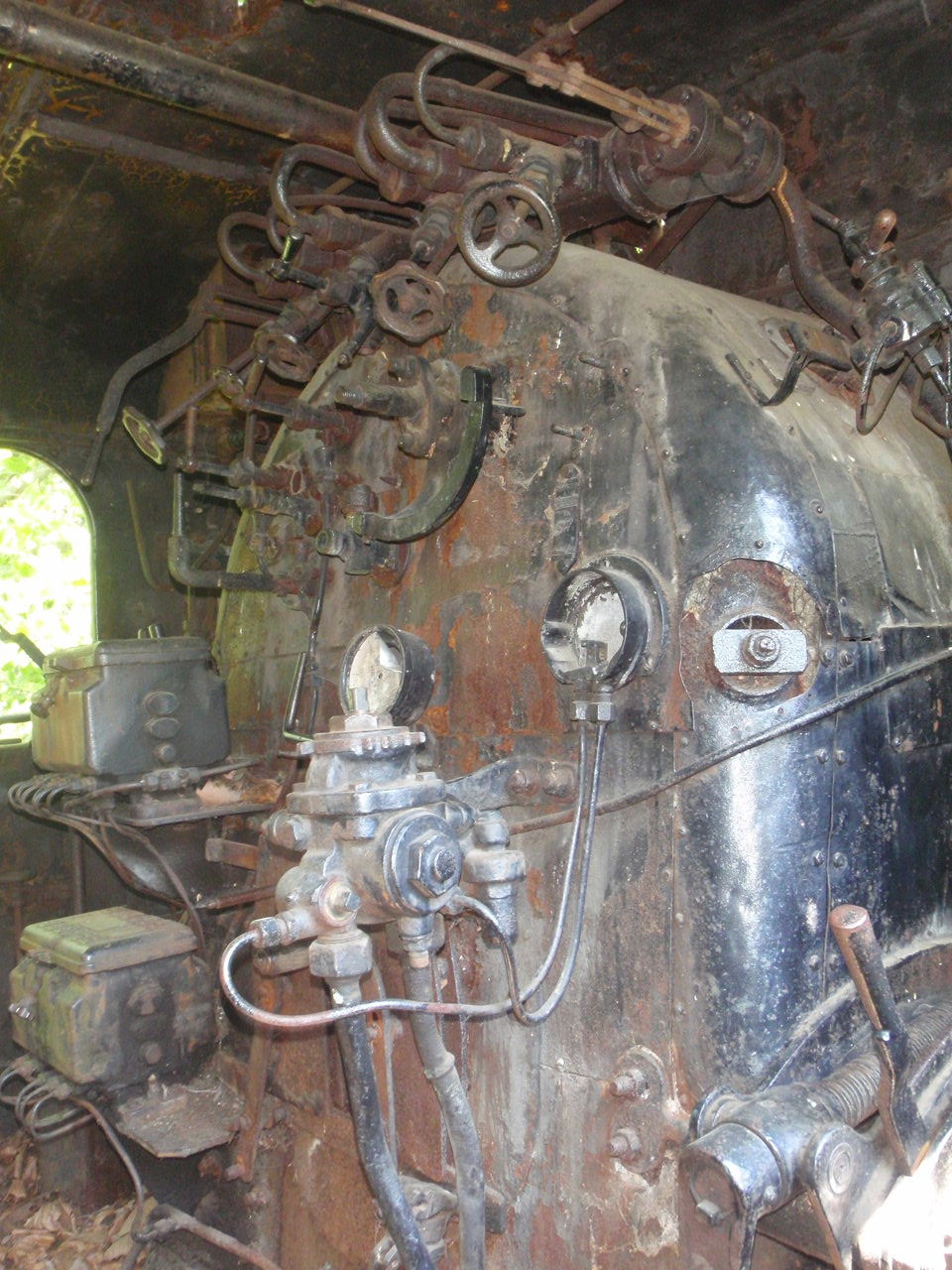 Lokomotivdenkmal in Güns, bei ehemalige MAV Kinderanstalten